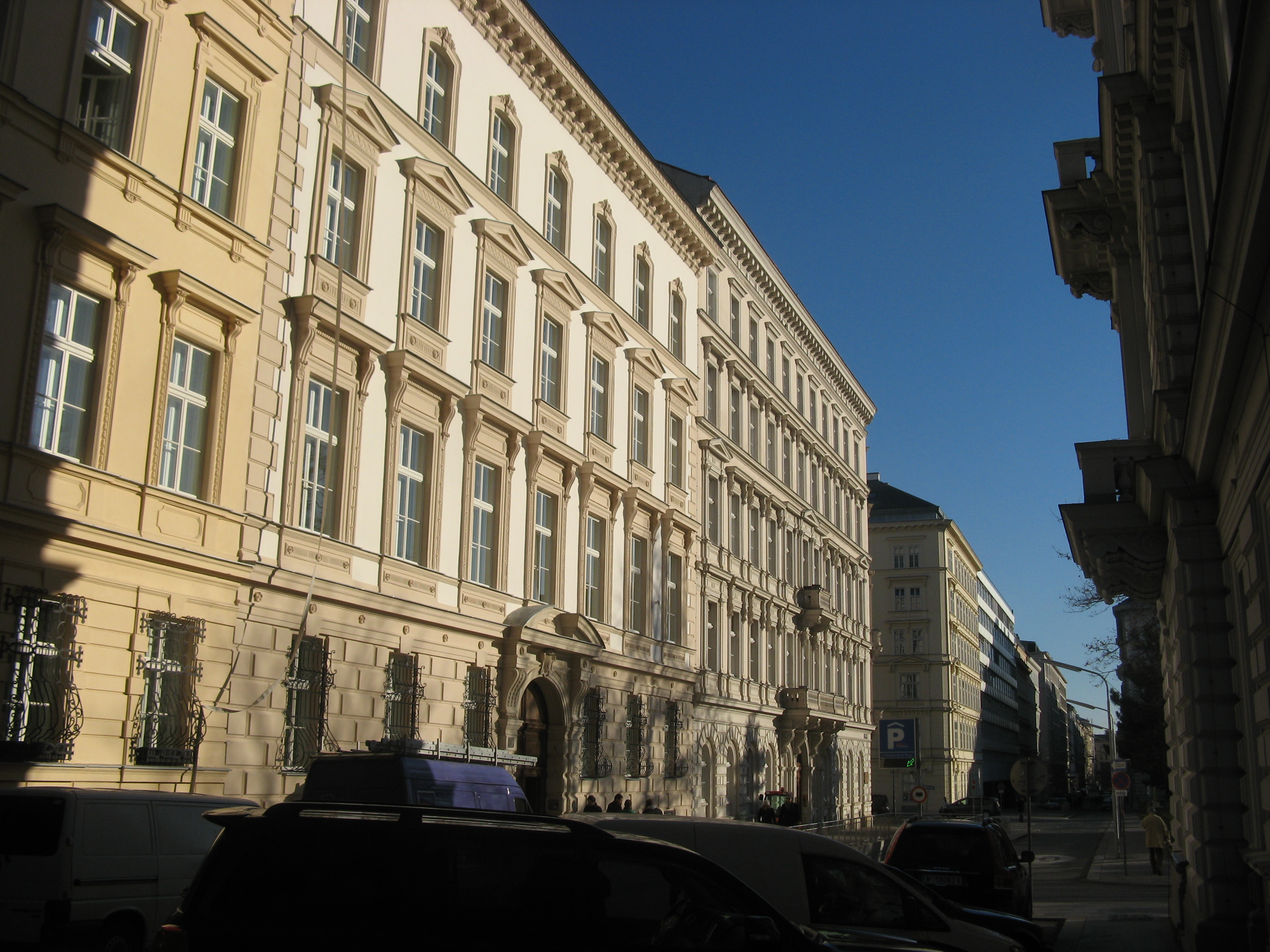 Elisabethstraße beim Schillerplatz (Nr. 16-20), Wien-Innere Stadt